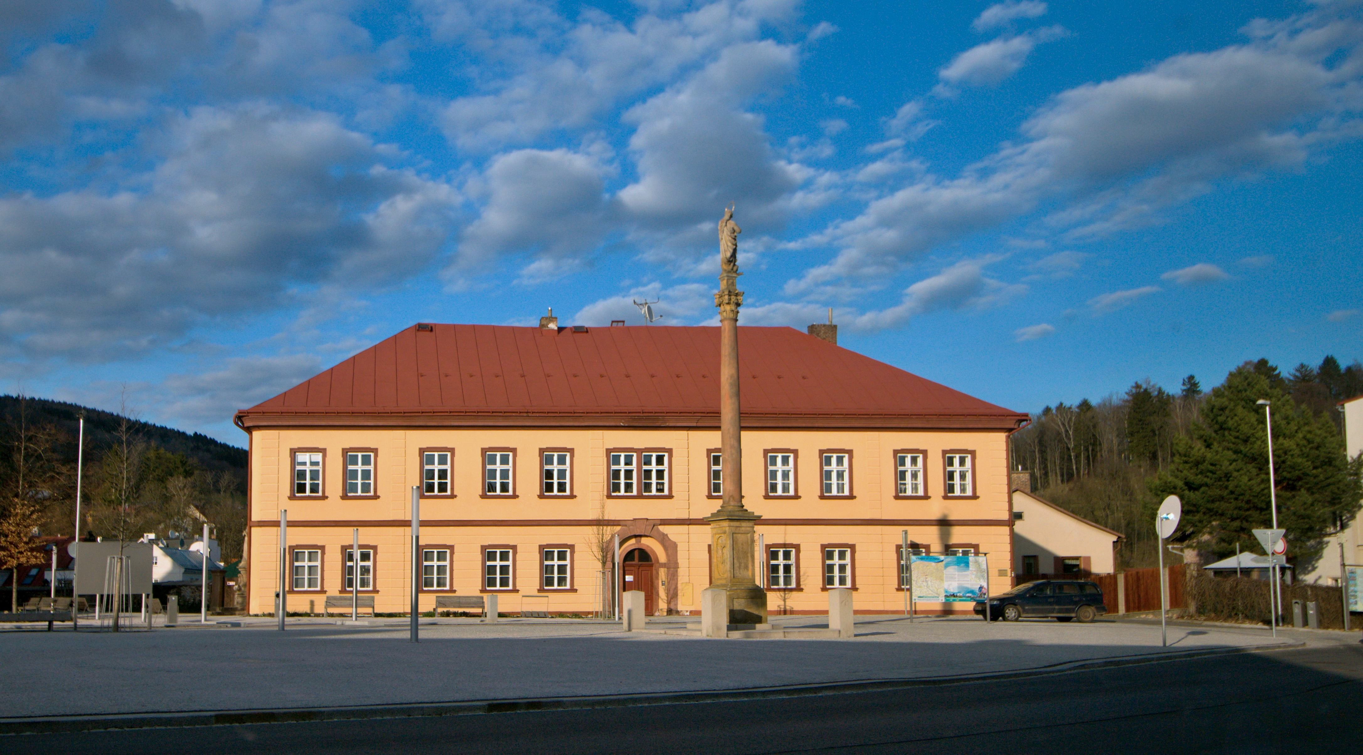 Vrchlabská fara-děkanství při kostele sv. Vavřince